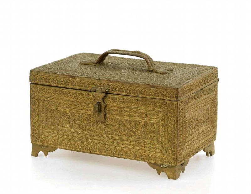 Sirihdoos. Sirihdoos met deksel van gedreven messing